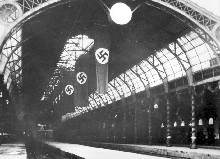 Østbanestasjonen i Oslo, i anledning Himmlers besøk i 1942.